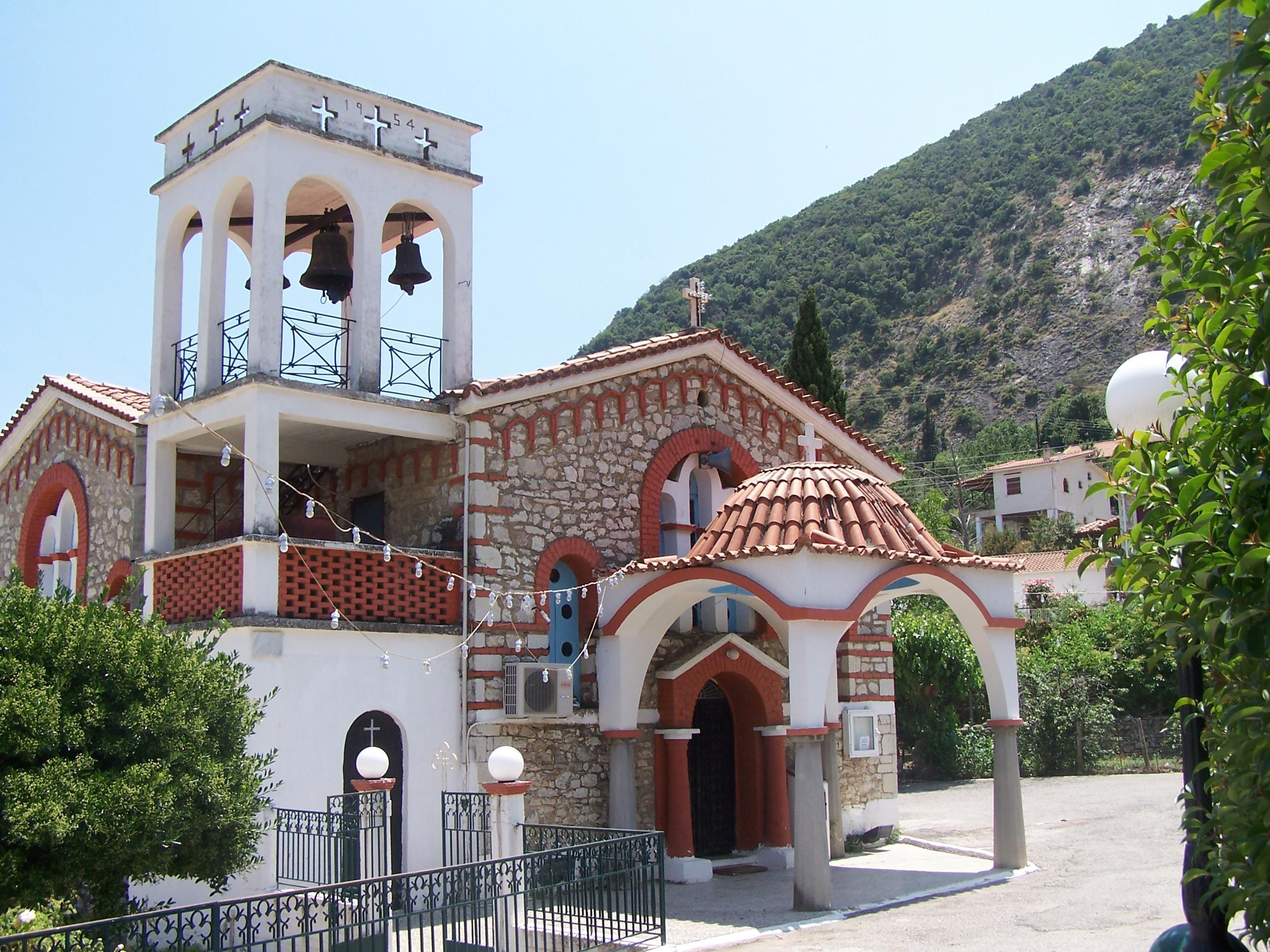 St. Athanasius-Kirche in Lakka